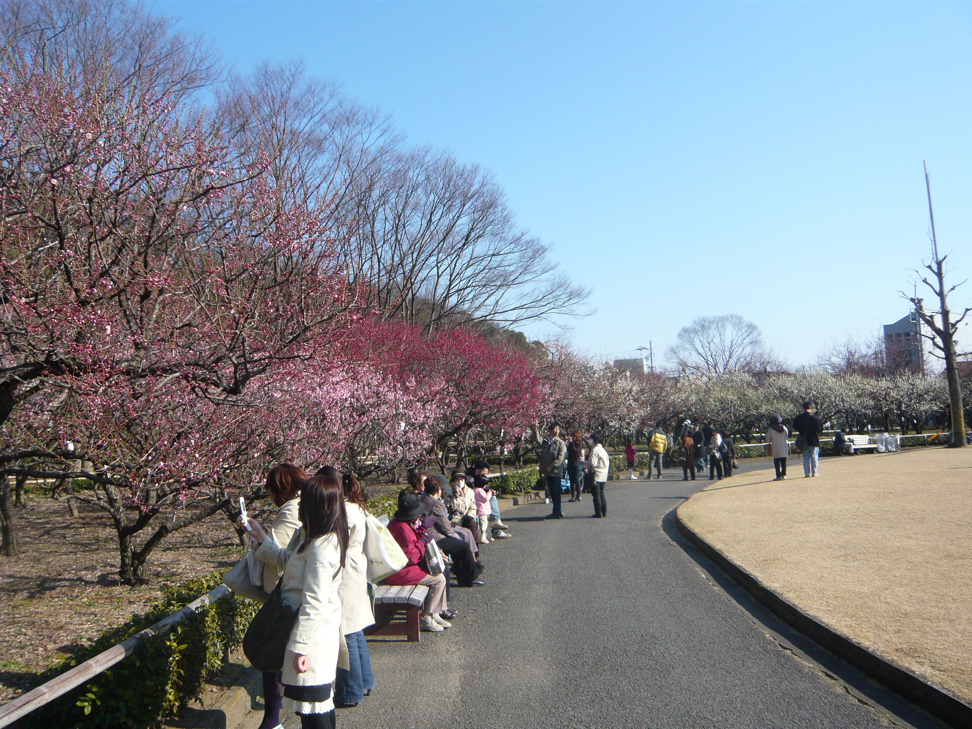 Bairin Park（梅林公園）,Gifu,Gifu,Japan（岐阜県岐阜市）で撮影。